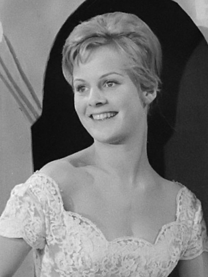 Televisie Weekendshow, Heidi Bruhl 30 oktober 1959